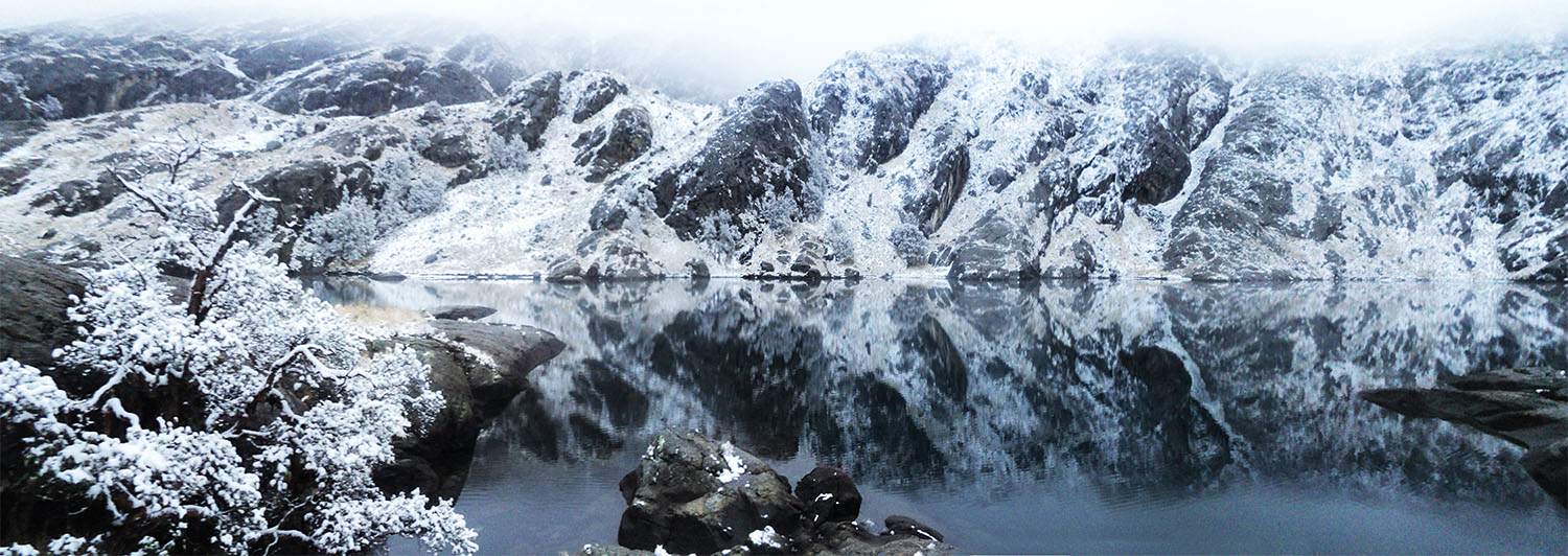 Laguna Aguak